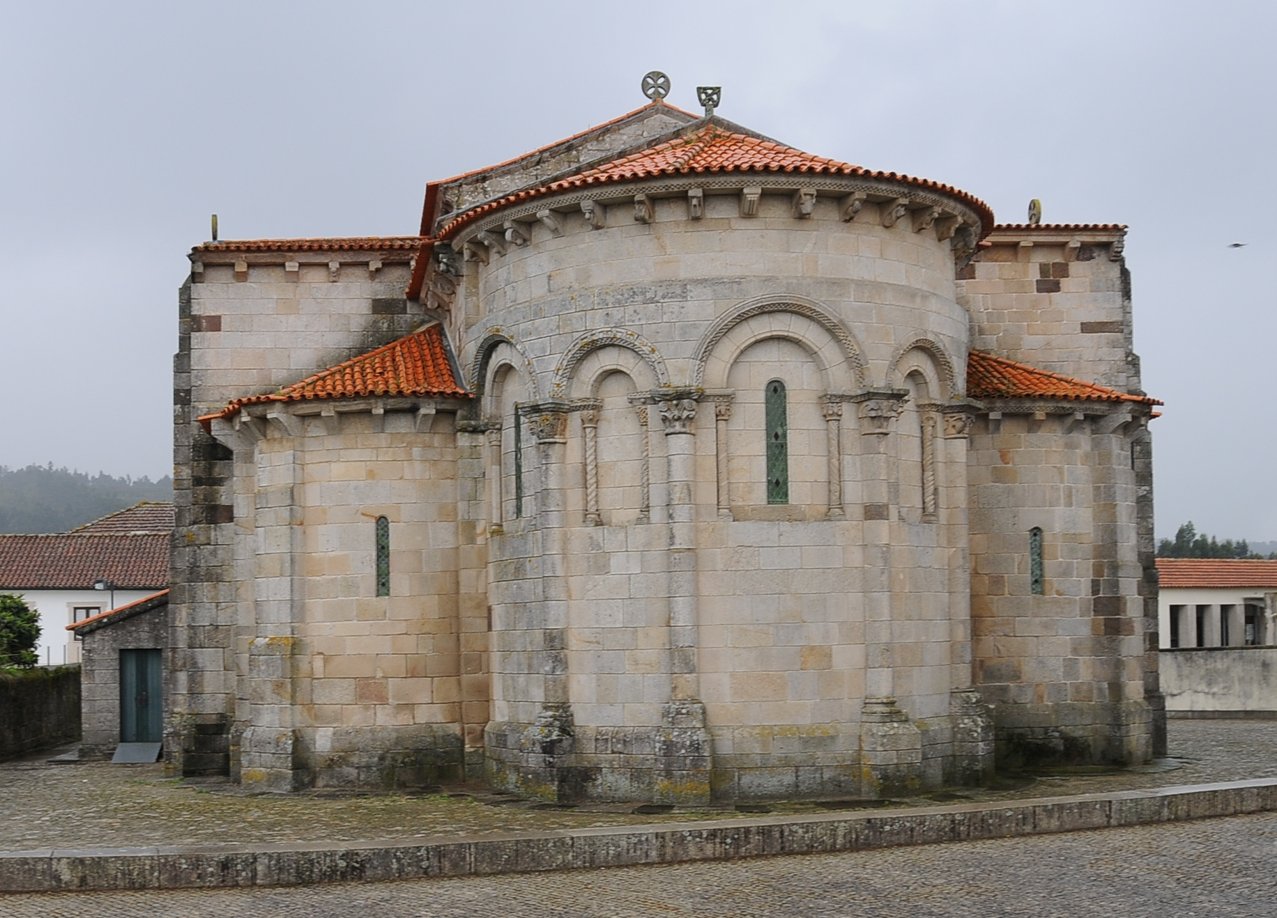 São Pedro de Rates Church, in Rates, Povoa de Varzim, Portugal